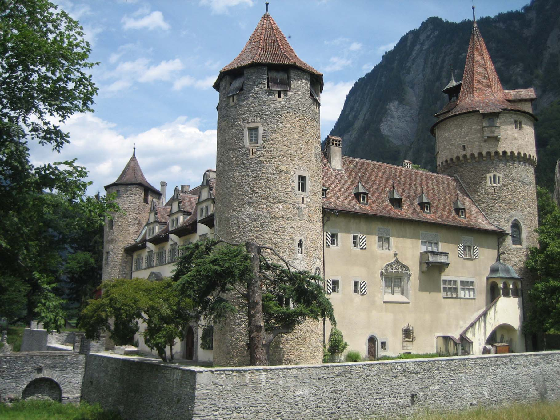 Eckturm im Südwesten